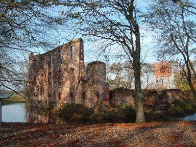 Trøjborg Slotsruin DE: Die Troiburg ist die Ruine einer Wasserburg westlich von Visby (Nordschleswig) in Dänemark